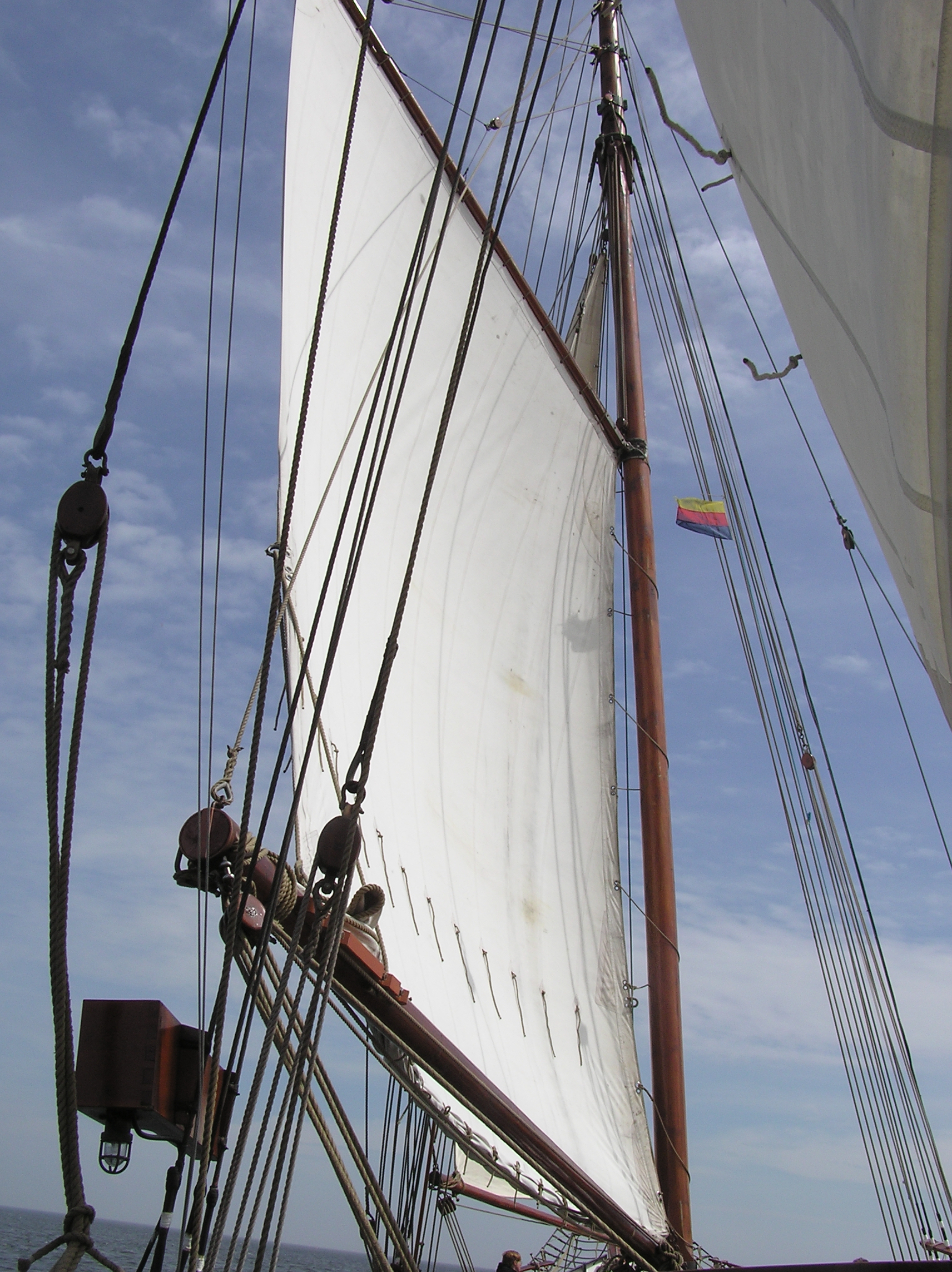 Gaffelsegel